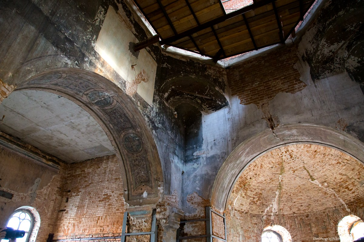 Интерьер реставрируемой Фёдоровской церкви. Вознесенский Сызранский мужской монастырь